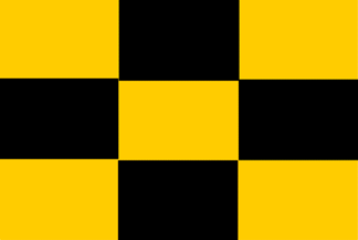 Genevois